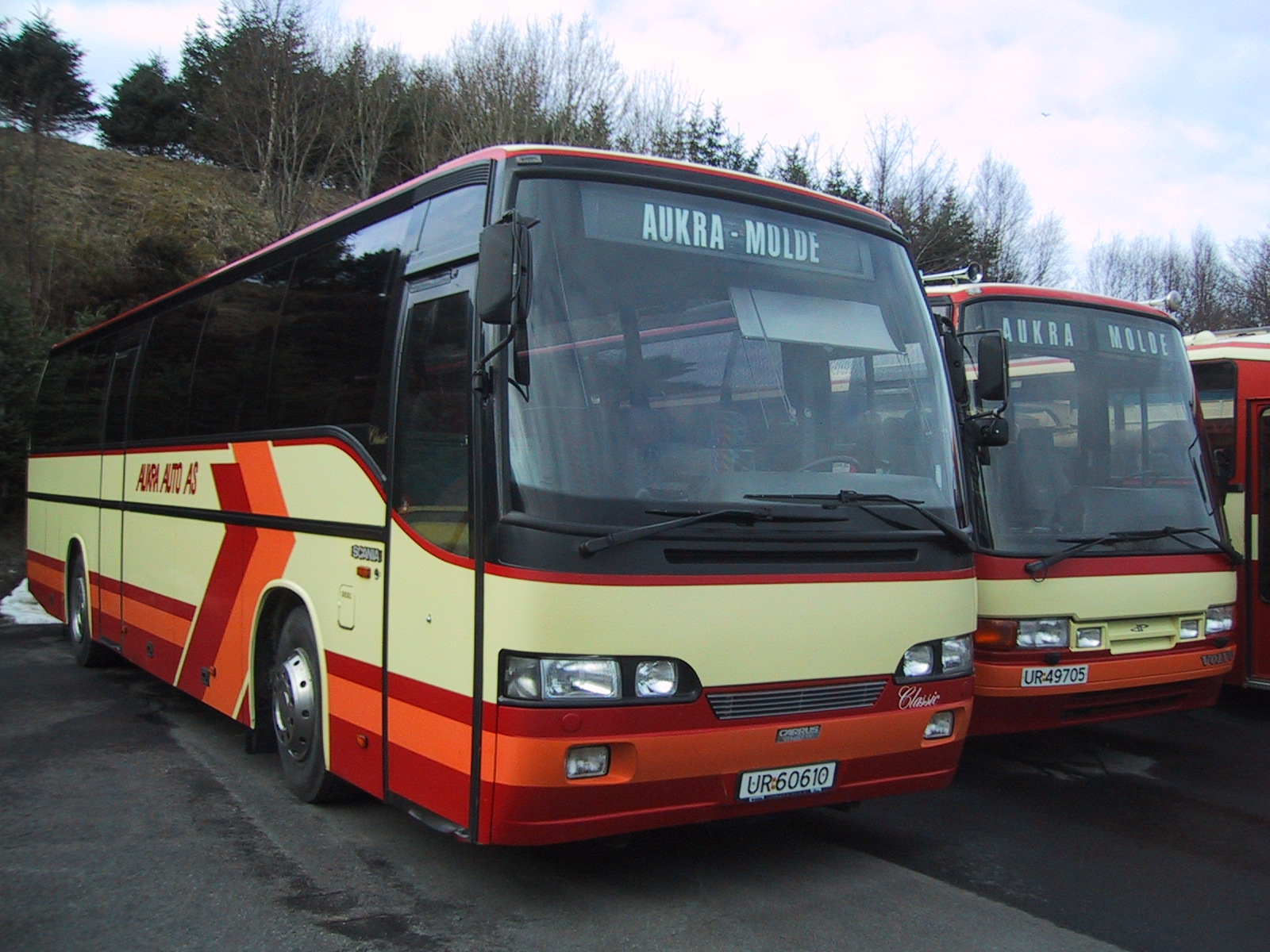 Dette er to av Aukra Auto AS sine rutebusser, fotografert på selskapets garasje på Bakkemyr i Aukra